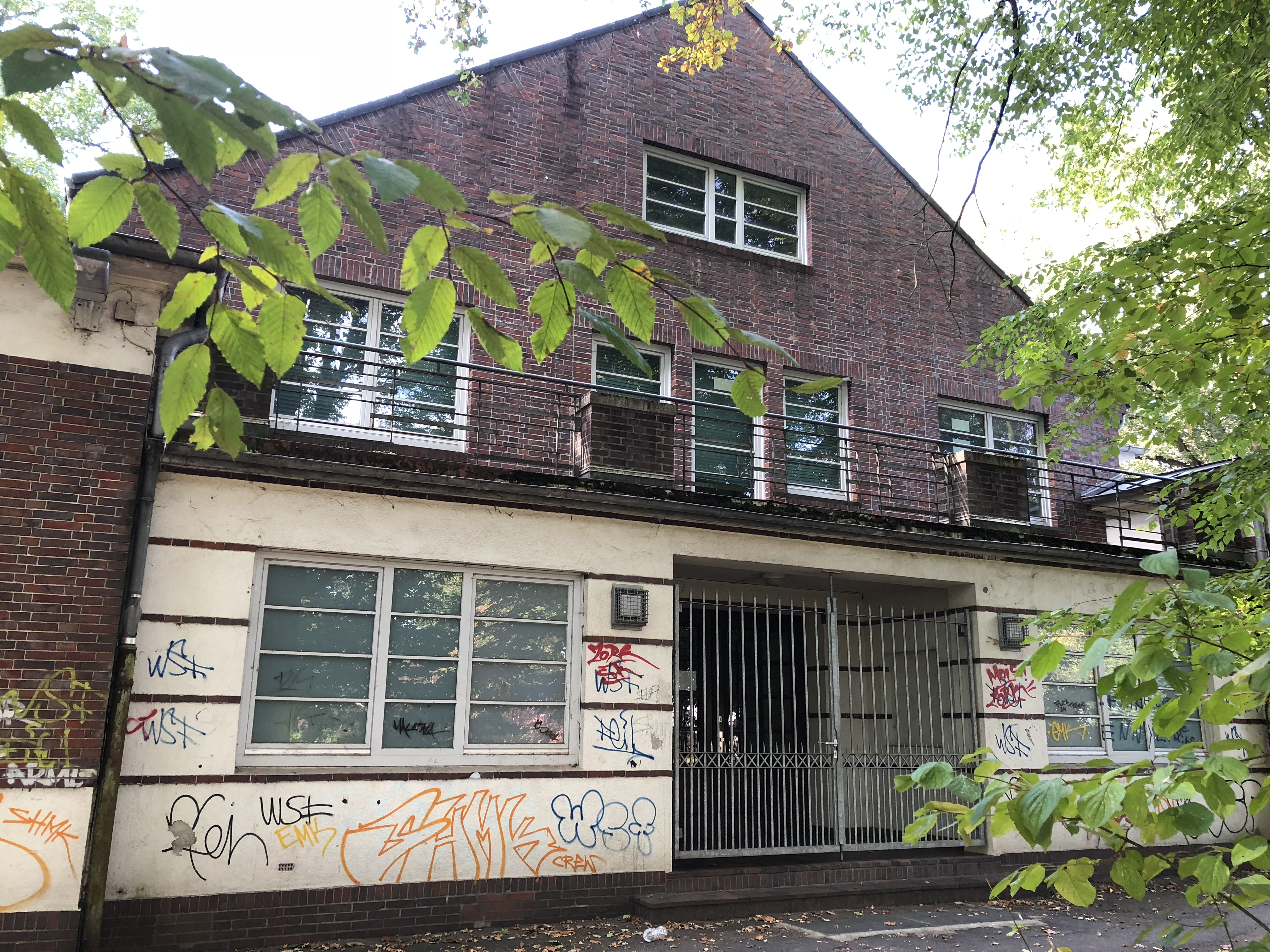 Turnhalle in Bremen, Ludwig-Jahn-Straße 6Das abgebildete Objekt ist ein geschütztes Kulturdenkmal in der Freien Hansestadt Bremen, mit der Nr. 2207 beim Landesamt für Denkmalpflege registriert.